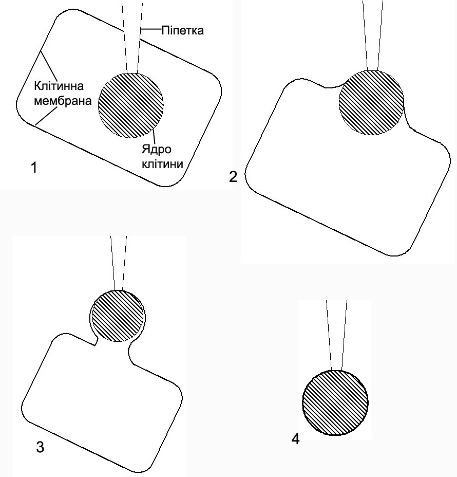 Схема встановлення nucleated-patch